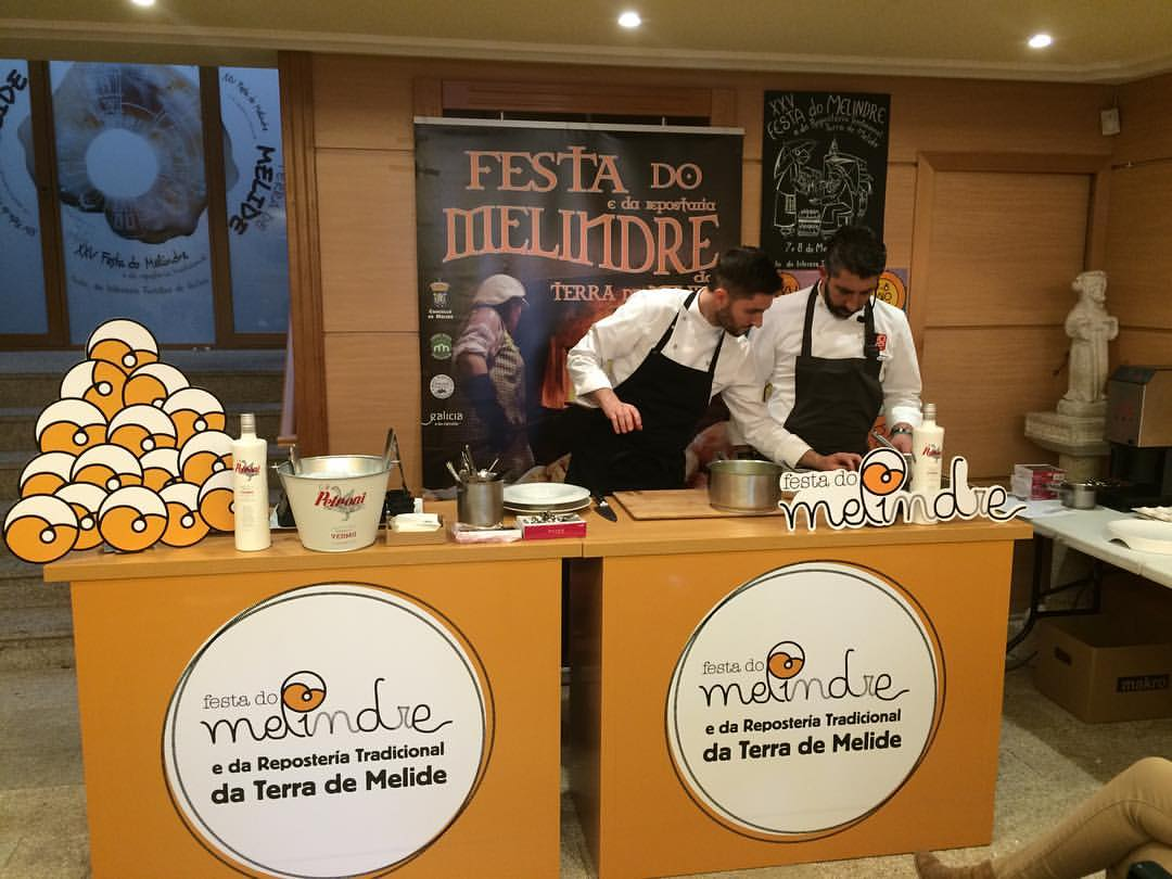 Showcooking de Xoán Crujeiras na festa do melindre de Melide.